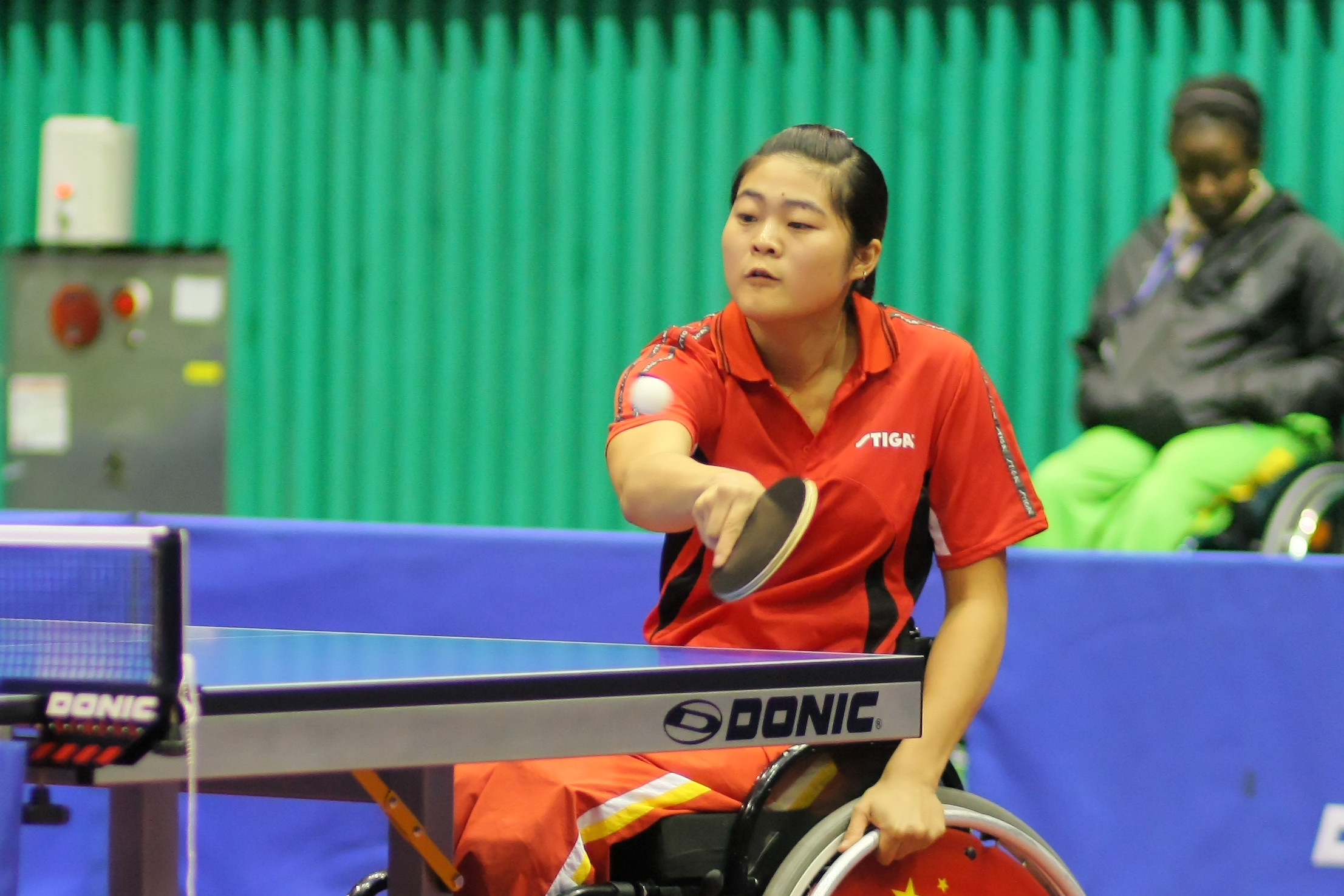 Zhou Ying (CHN)